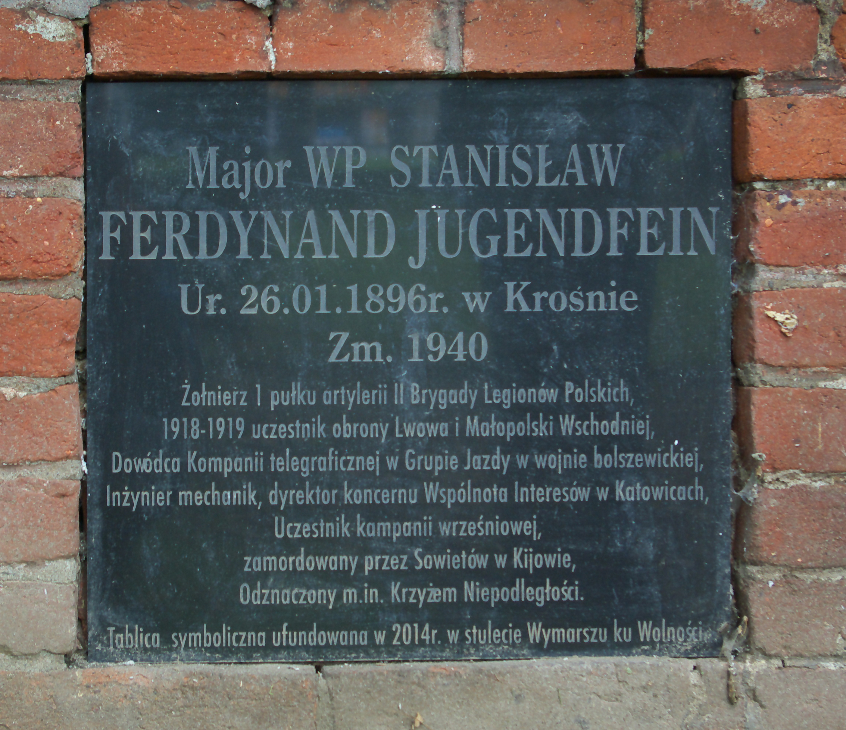 Grobowiec rodziny Jugendfein na Starym Cmentarzu w Krośnie.